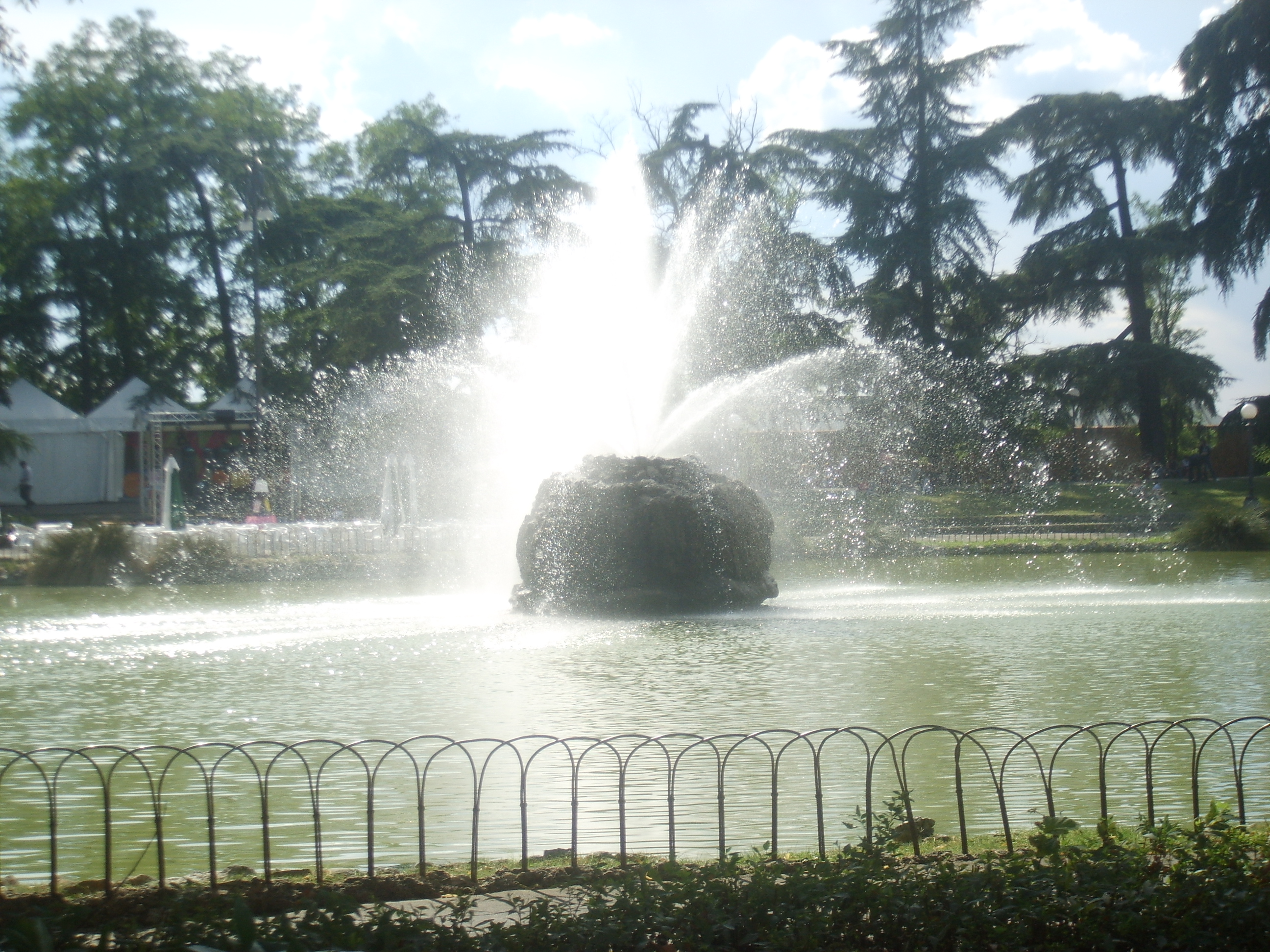 Fortezza da Basso in Florence, Italy.